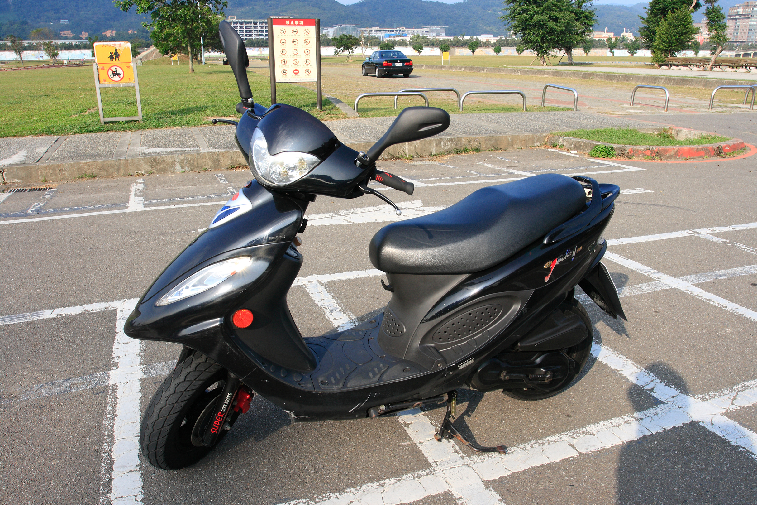 Kymco G3 Mark II.